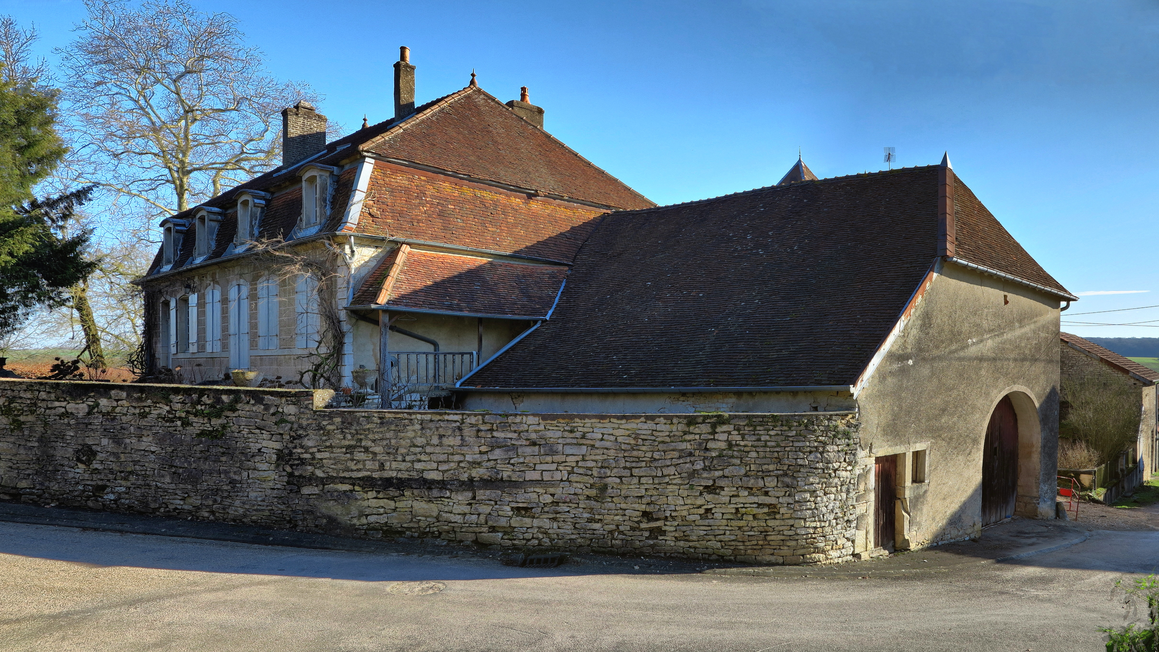 Maison